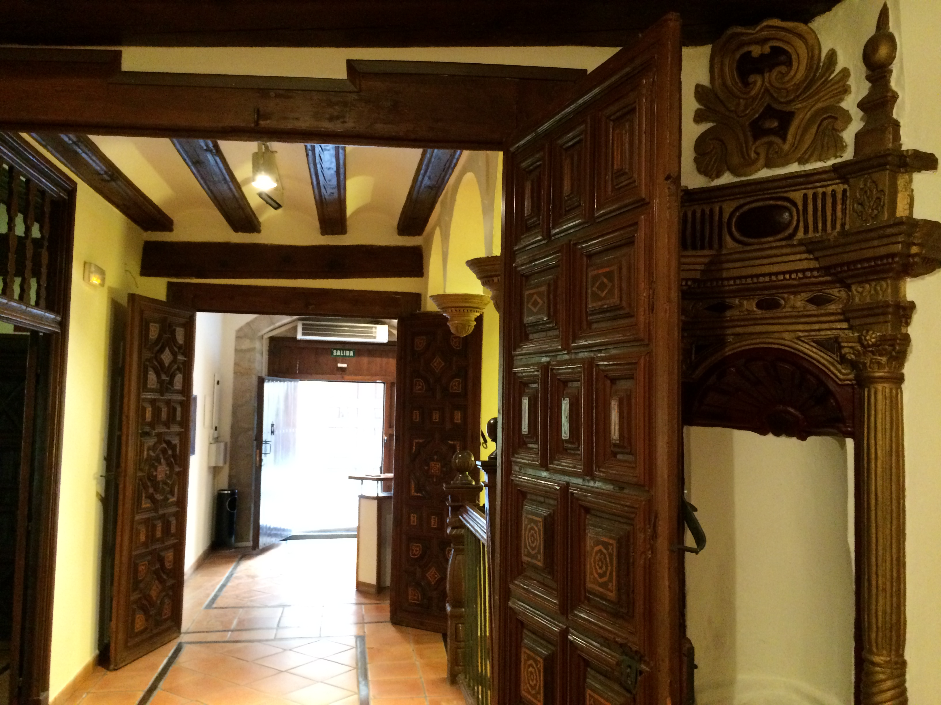 Museo Juan Cabre. Salas interiores.